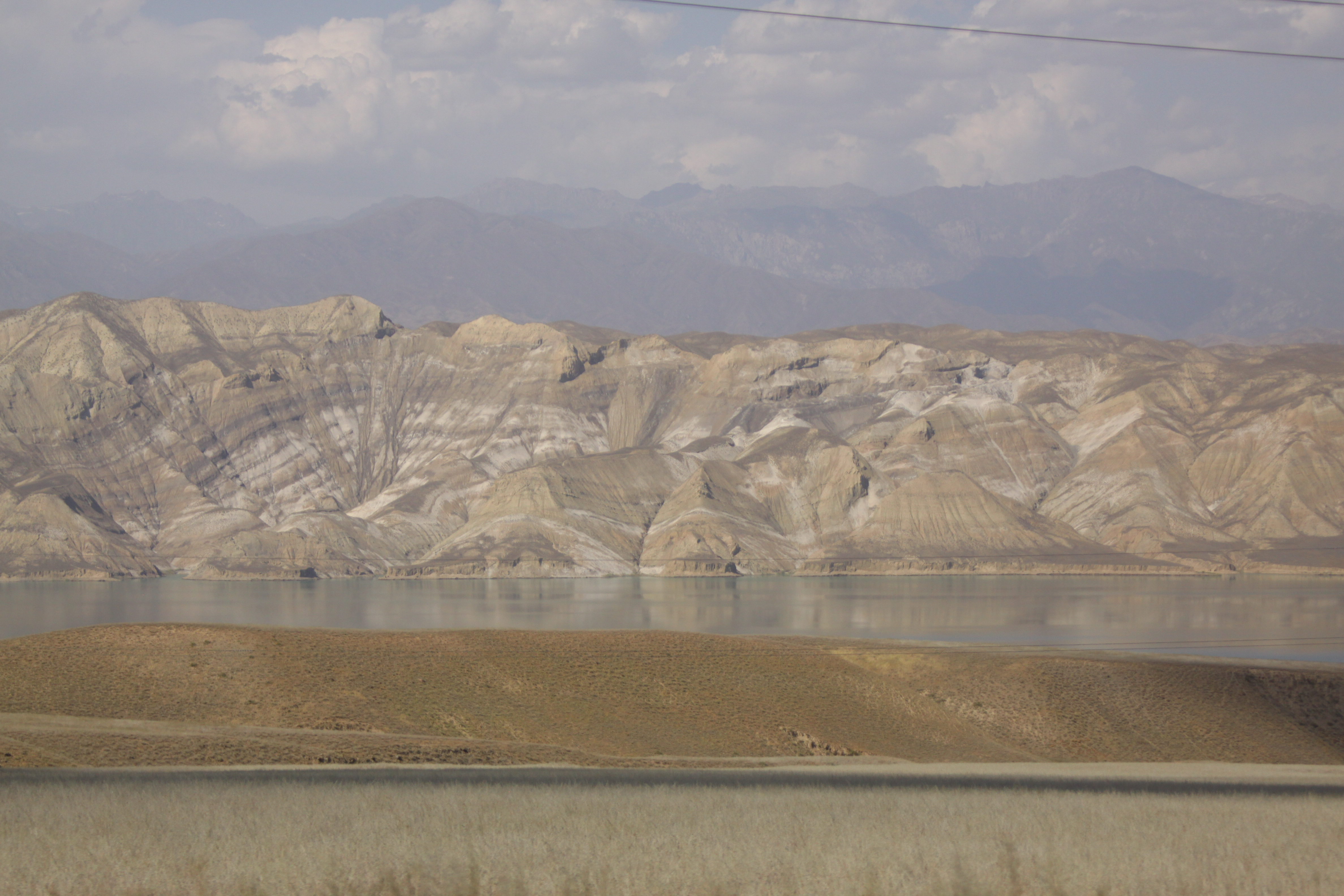 Cote nord-est du lac de Toktogul